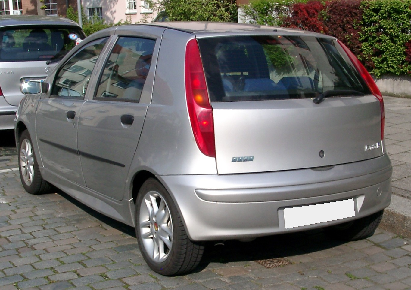 Fiat Punto, 2. Generation